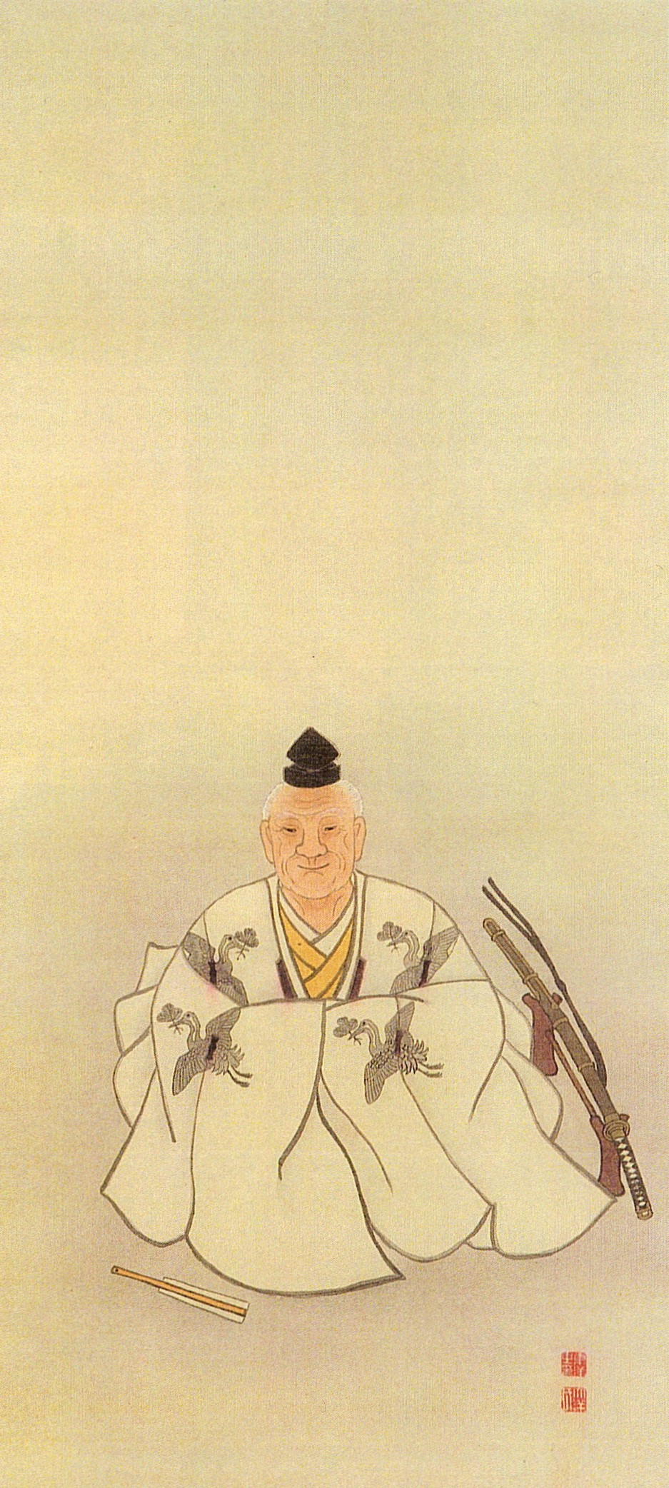 陸奥角田領初代領主・石川昭光の肖像画。